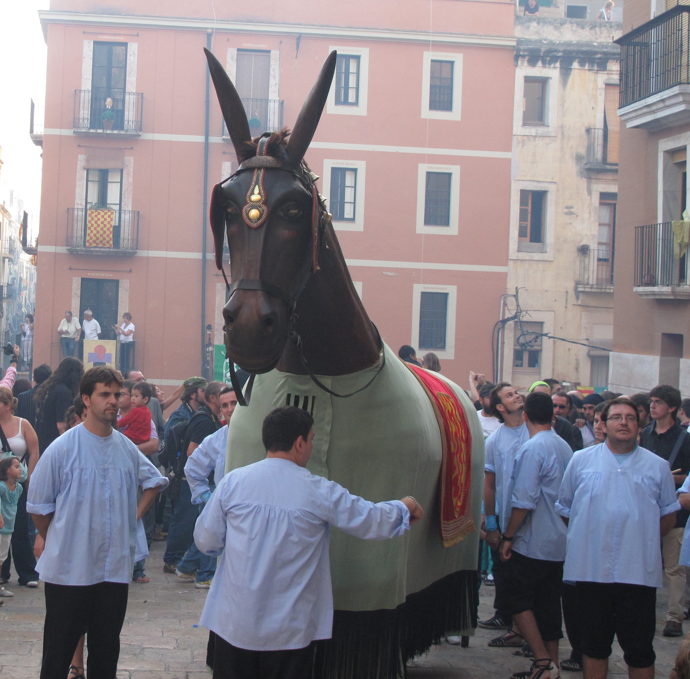 la mulassa de tarragona